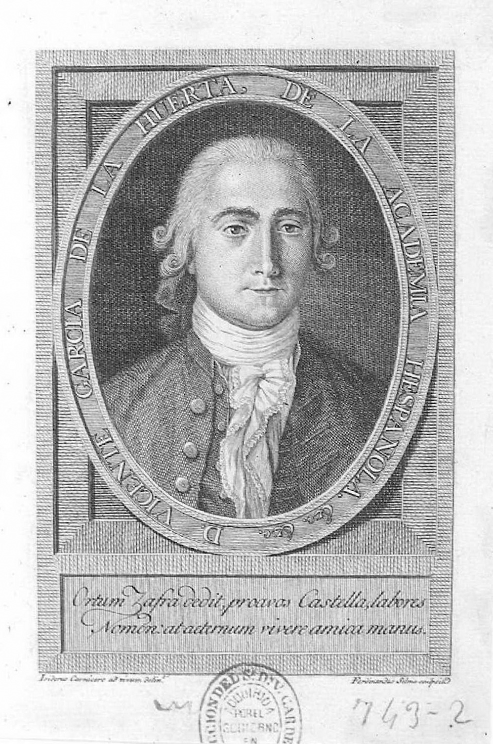 Retrato de Vicente García de la Huerta, ilustración de Theatro hespañol, Imprenta Real, 1785. Grabado calcográfico, firmado Isidorus Carnicero ad vivum delin.t, Ferdinandus Sellma sculpsit